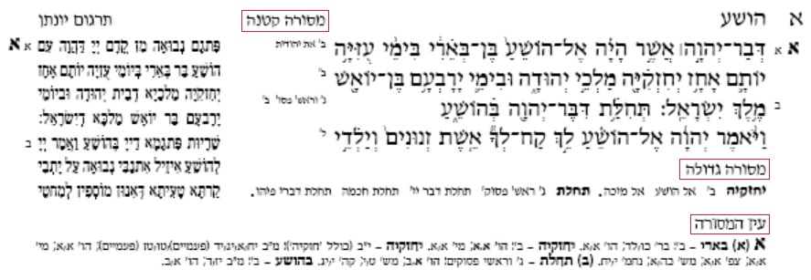 חלק מדף 'מקראות גדולות הכתר' בו ניתן לראות את המסורה הקטנה, המסורה הגדולה ואפראט עין המסורה (הודגשו לצורך הנוחות בריבועים אדומים).